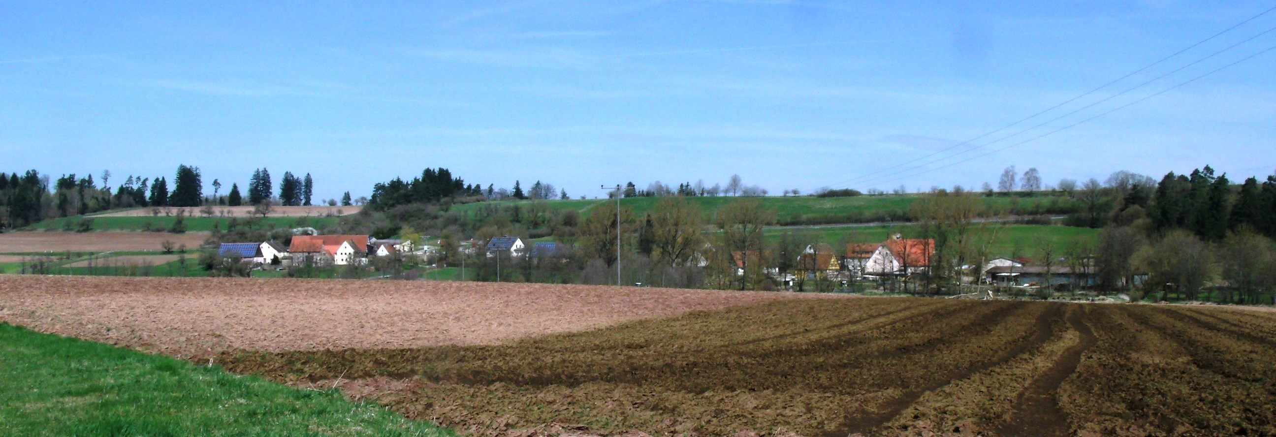 Steinbächlein, Ortsteil von Leutershausen im Landkreis Ansbach